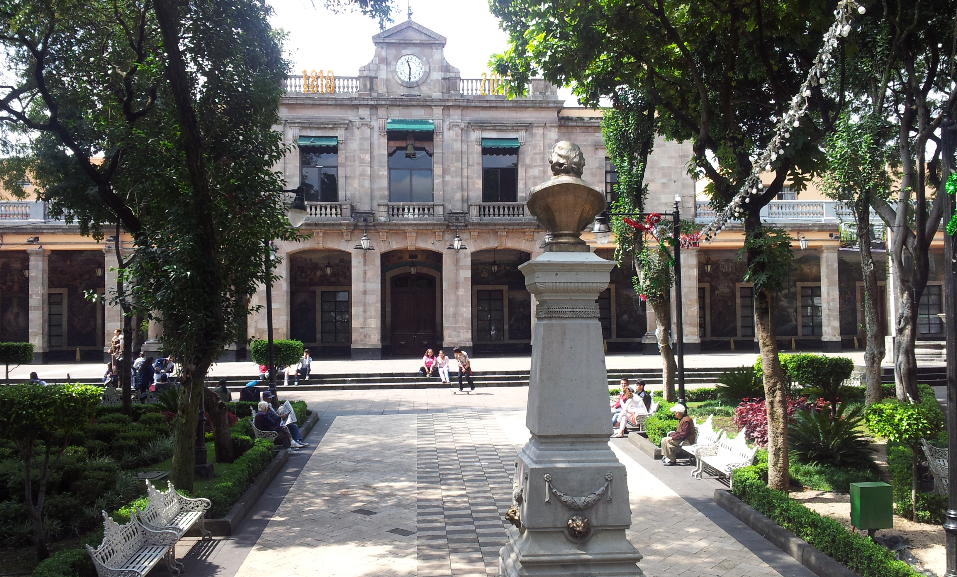 Palacio Municipal (Tlalpan)